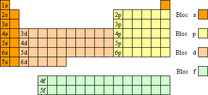 Blocs_taula_periòdica Versió en català feta per mi, a partir de la versió en castellà; ca::Image:Bloques_tabla_periódica.png